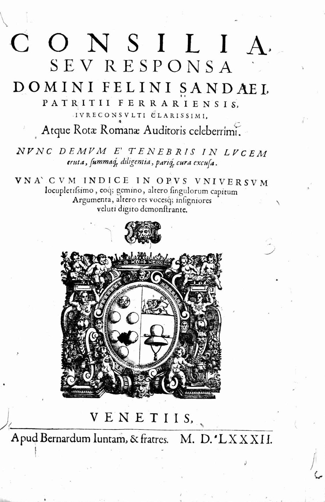 Frontespizio